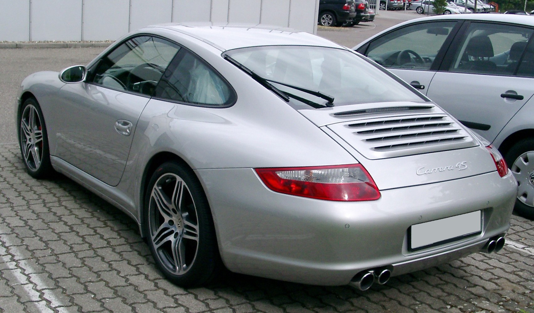 Porsche Carrera 4S